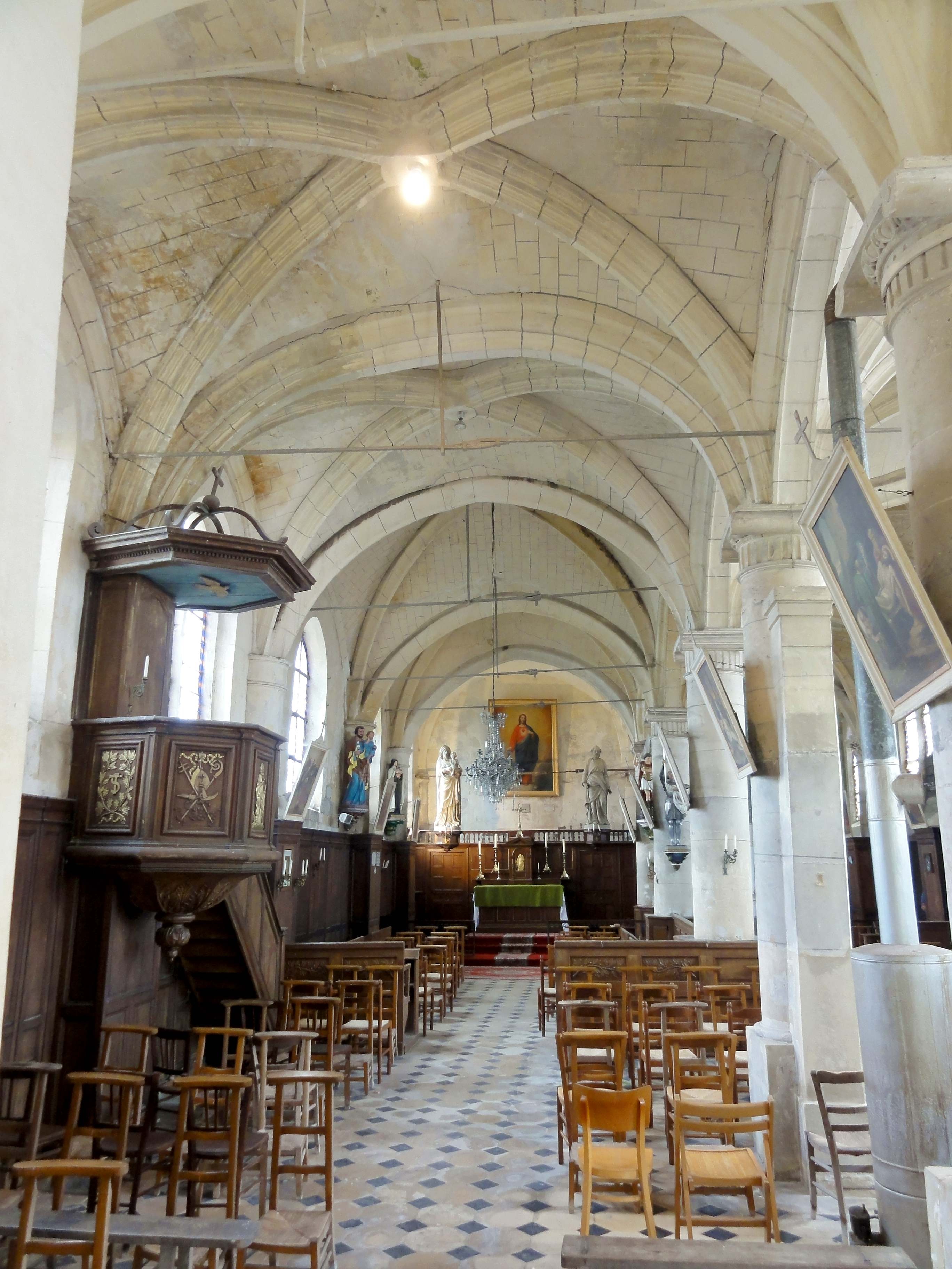 Intérieur de l'église (voir titre).